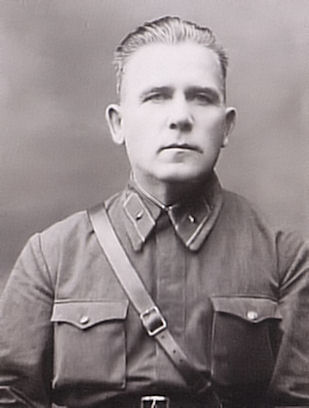 139. Jalkaväkidivisioonan komentaja Pavel G. Pondelin.